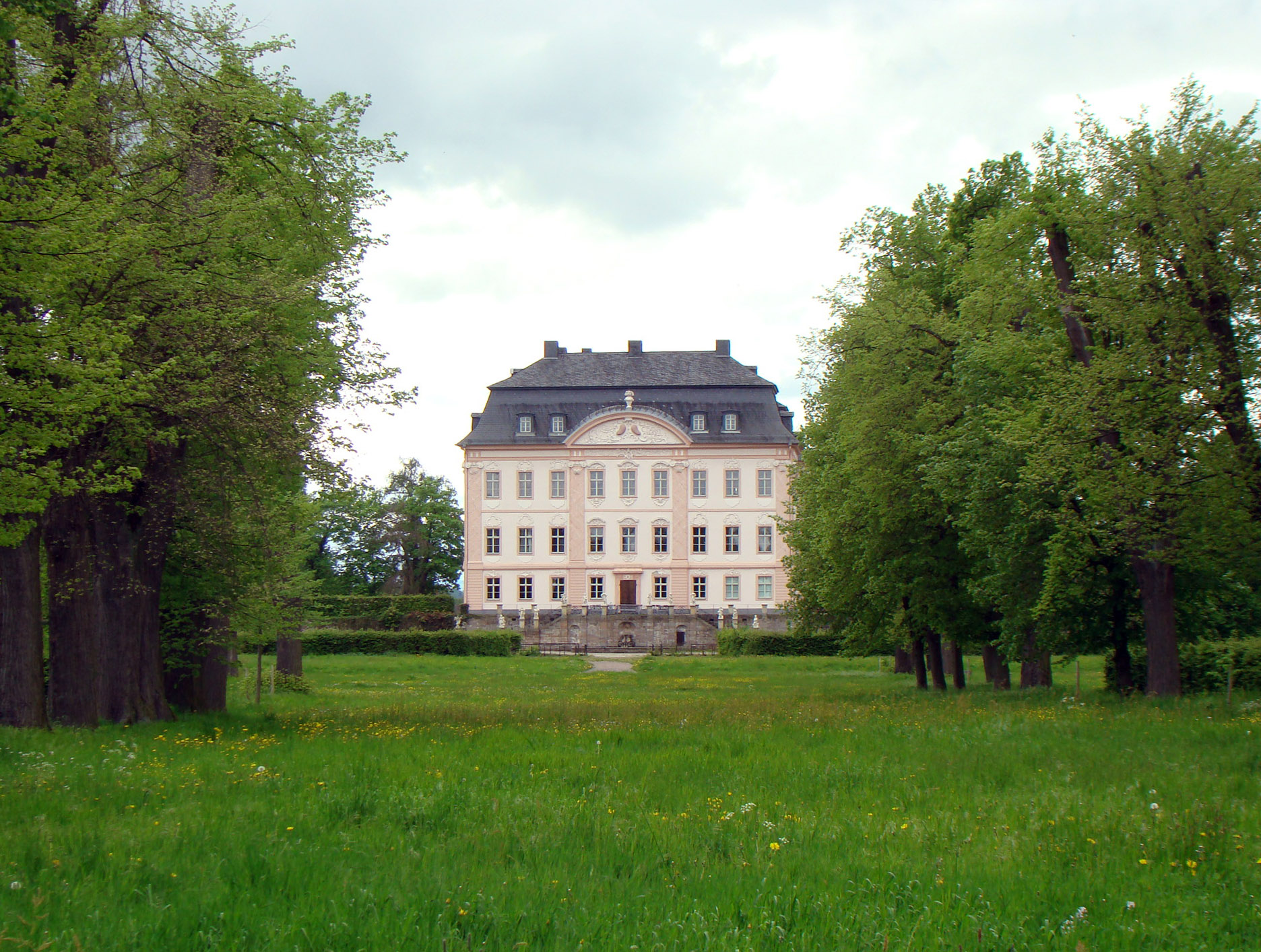 Oppurg Castle